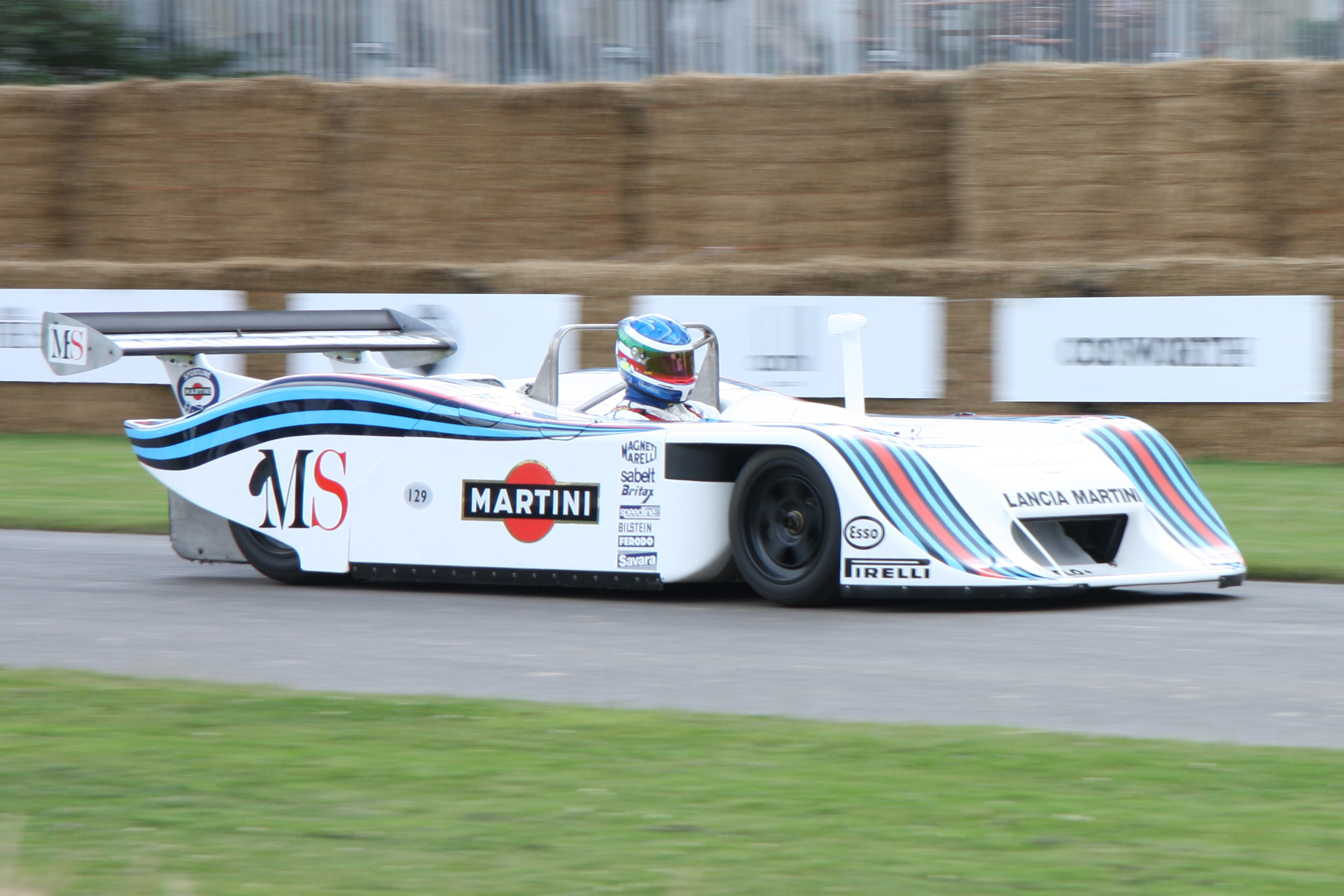 Built 1982. 1.4 litre 4 cylinder turbo.